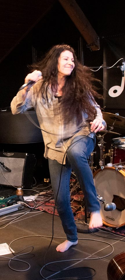 Fra konsert i Horten